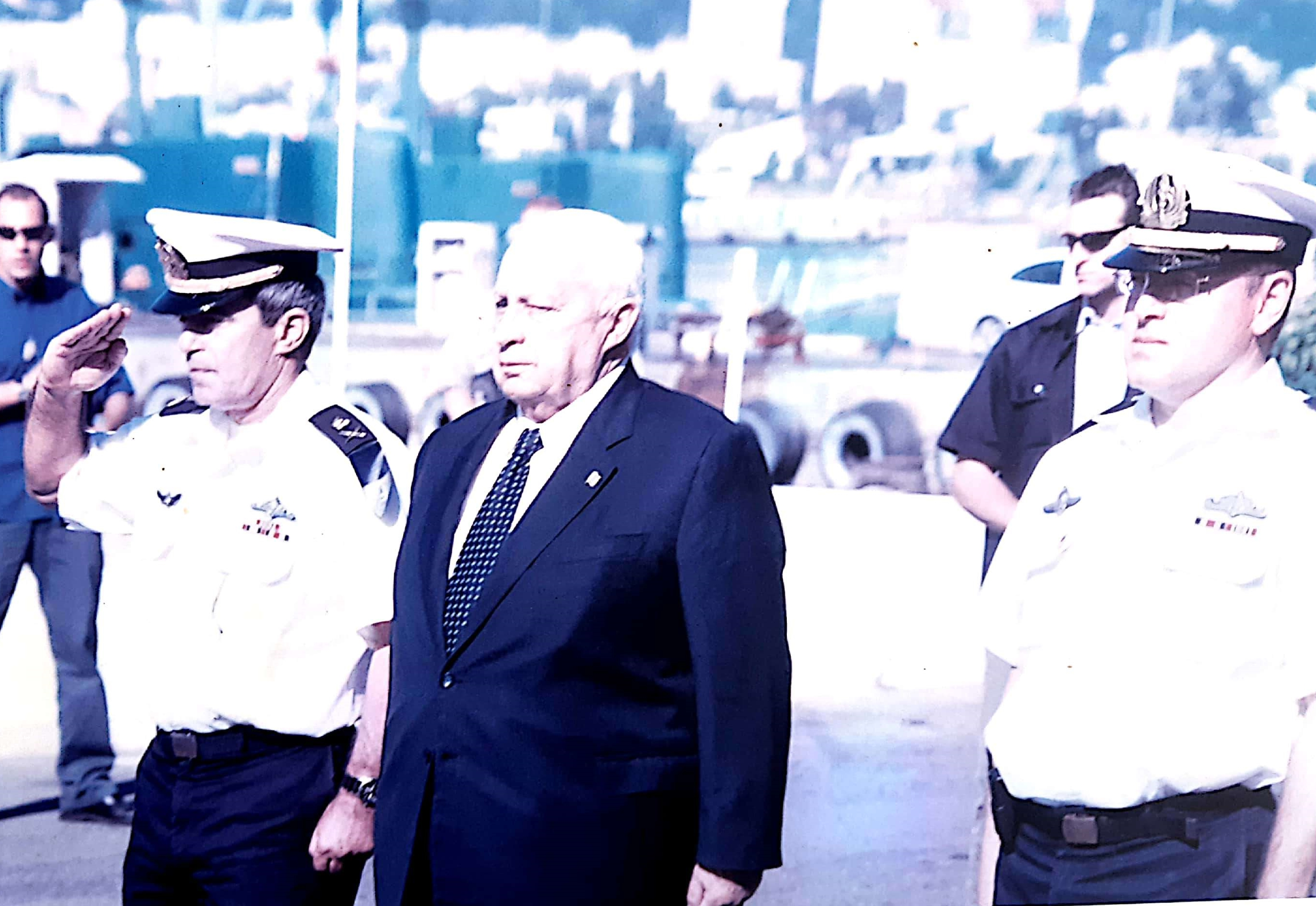 מפקד בסיס חיפה דוד לוריא, מימין, מארח את ראש הממשלה אריאל שרון ומפקד חיל הים ידידיה יערי 2002